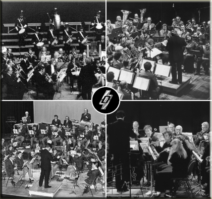 Historie Hoorns Harmonie Orkest HHO